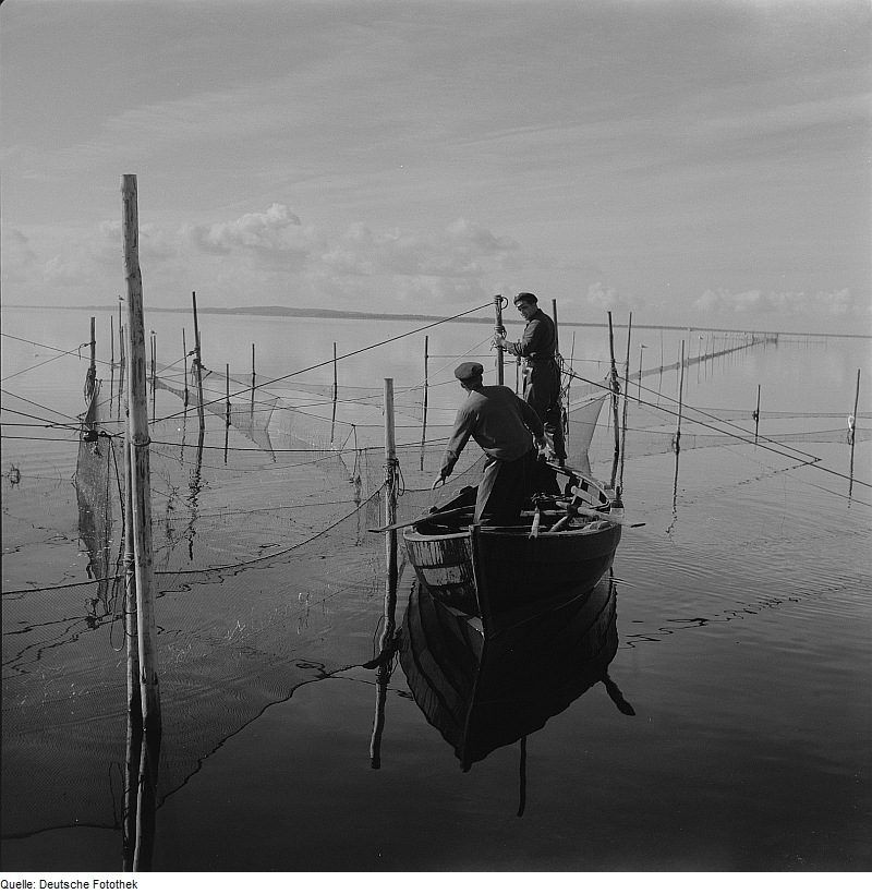 Original image description from the Deutsche Fotothek Reusenfischer vor Hiddensee